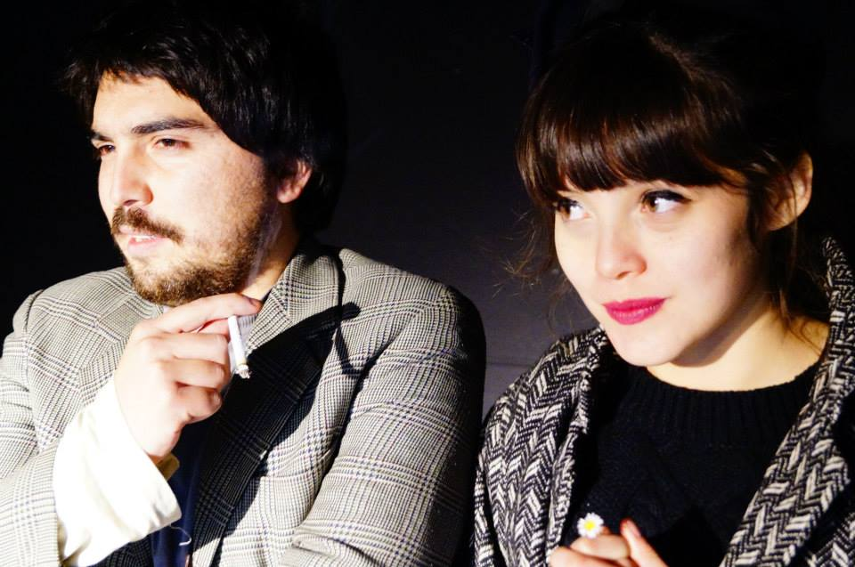 Zampano y Gelsomina